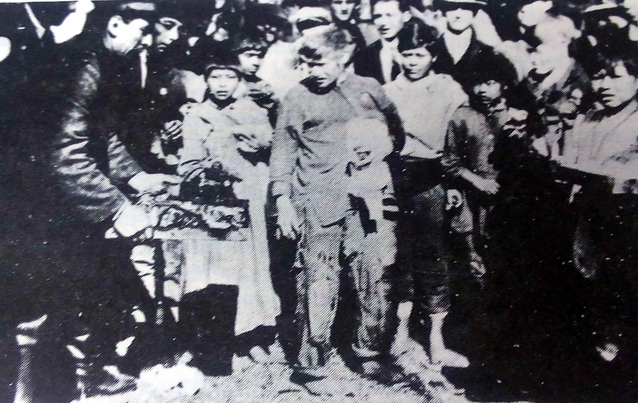 Acto fundacional de Oberá el 9 de julio de 1928. El comisario Solari ofrece un asado al cacique Luciano.